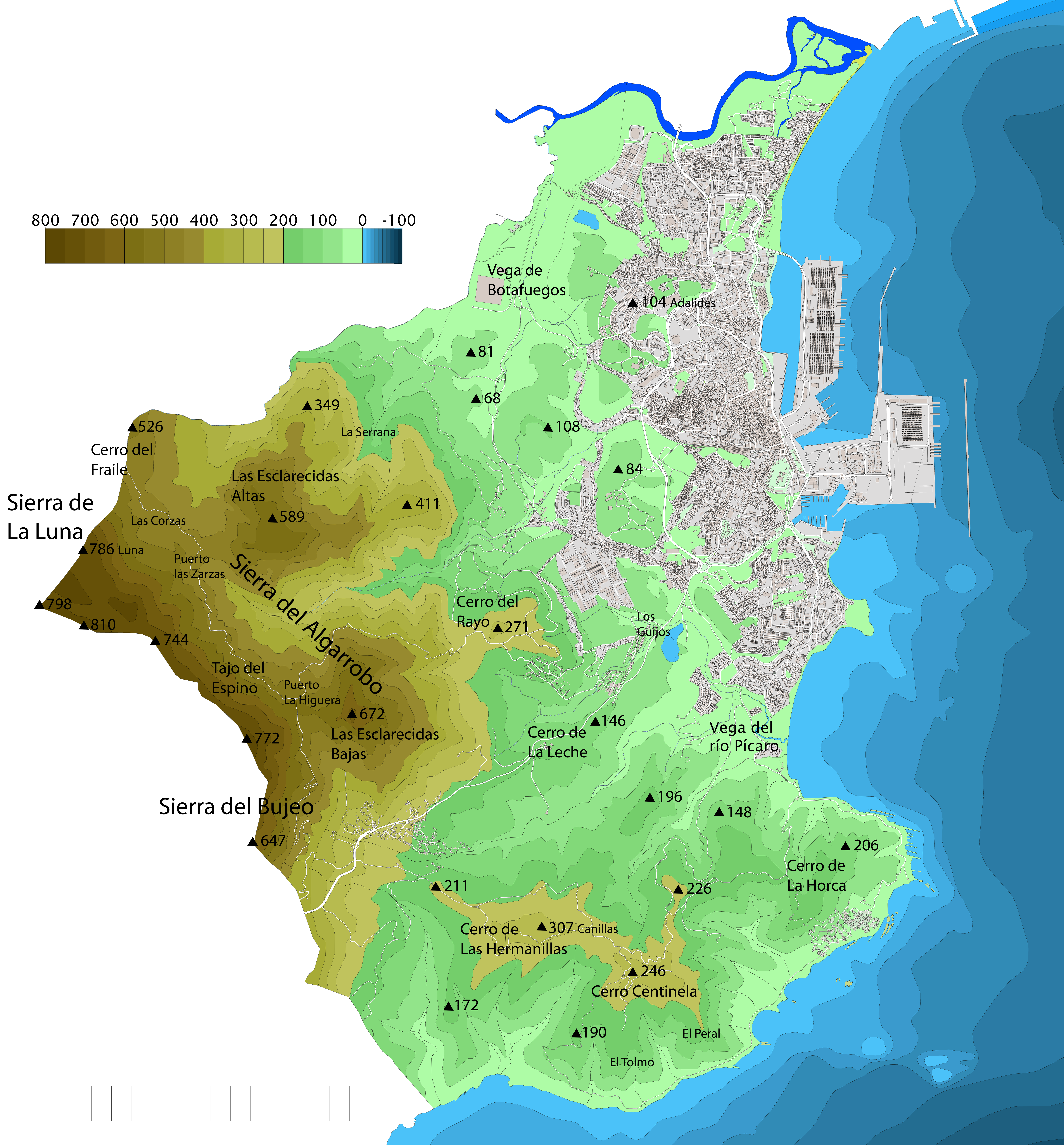 Mapa del término municipal de Algeciras indicando su topografía. Algeciras, Andalucía, España.